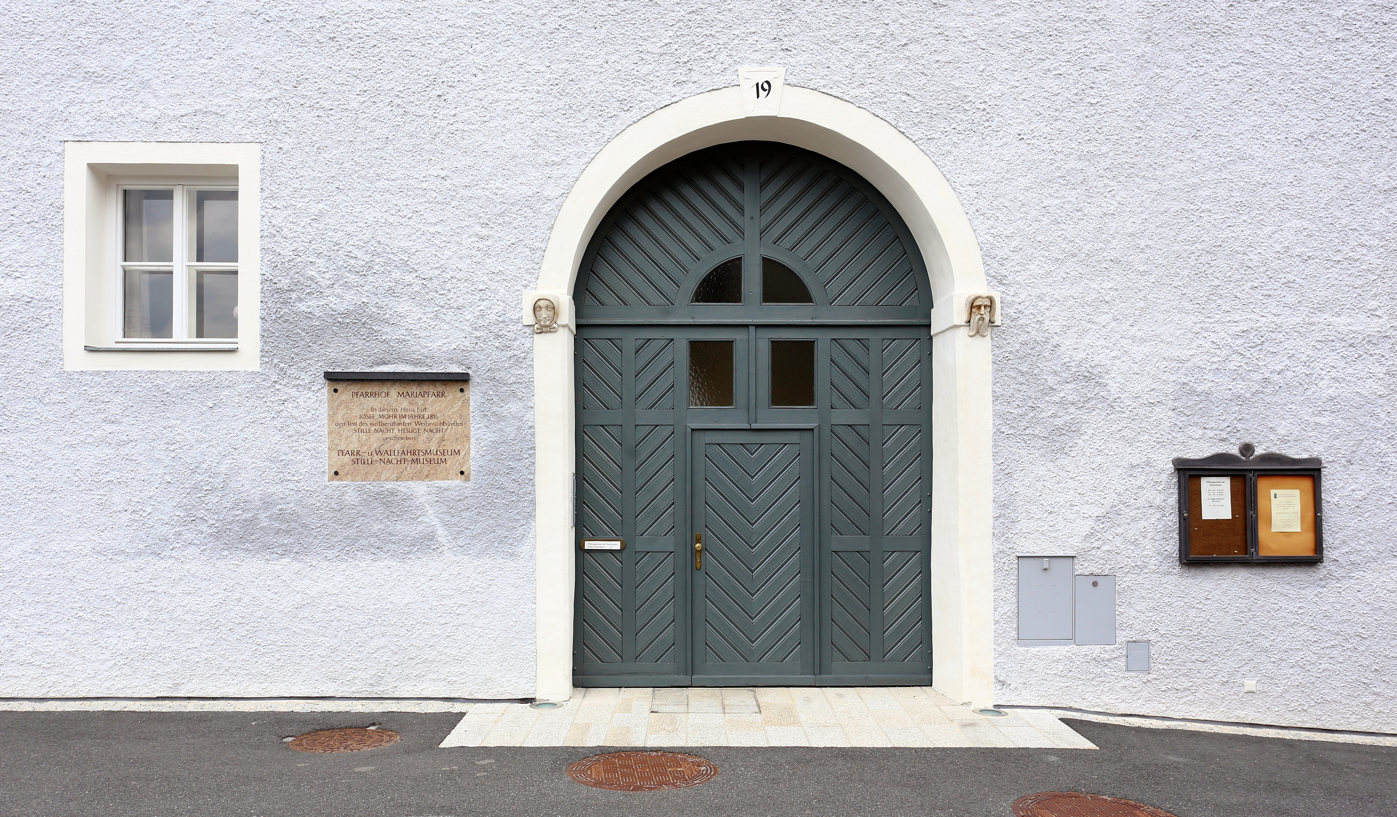 Pfarrhof der Salzburger Gemeinde Mariapfarr. Eine Gedenktafel weist darauf hin, dass in diesem Pfarrhof 1816 Joseph Mohr den Text des weltberühmten Liedes Stille Nacht, heilige Nacht schrieb.